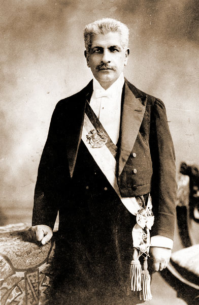 President Pedro Montt Montt (Chile)